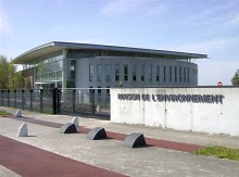 Maison de l'environnement de l'aéroport de Orly, près de Paris